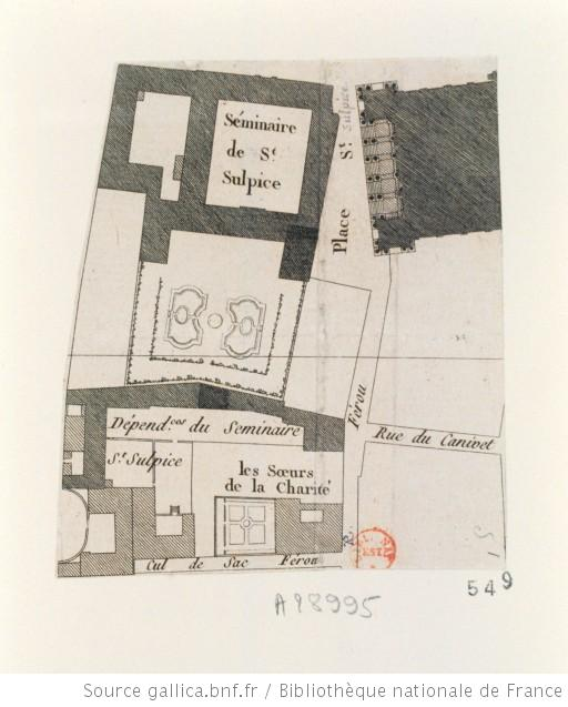 Eglise et séminaire Saint-Sulpice sur le plan de Paris de Verniquet à la fin du XVIIIe siécle.